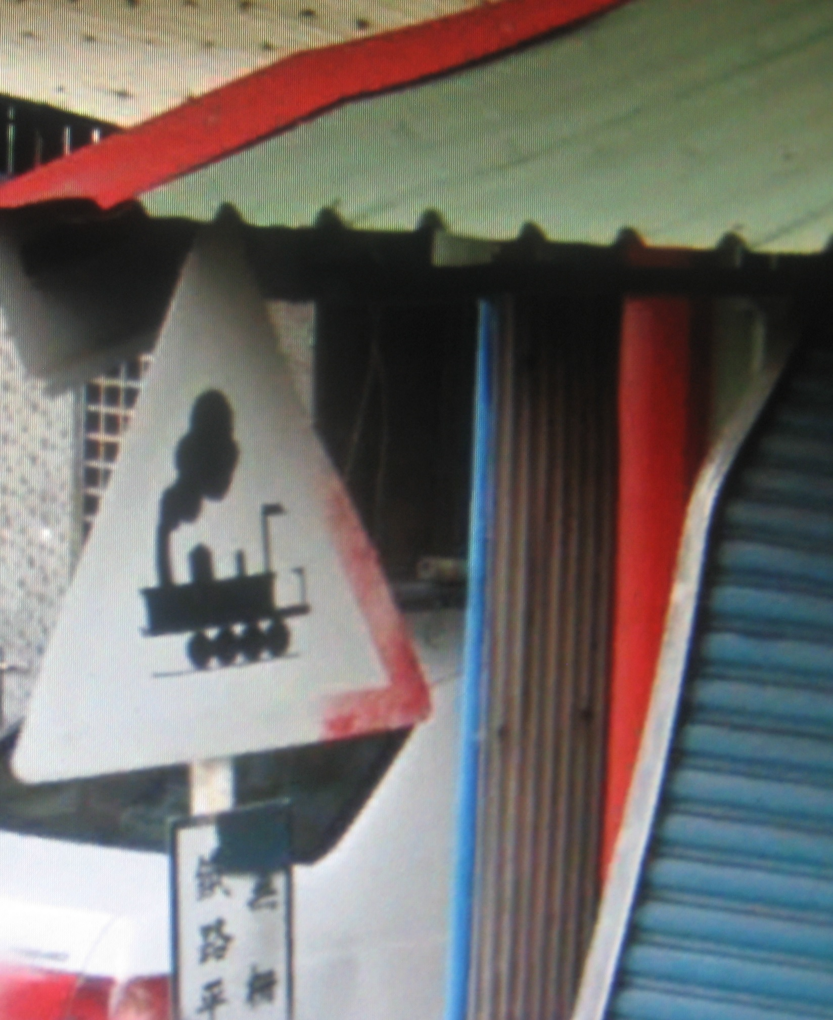 中文（台灣）: 高雄市大寮區三隆里無柵欄鐵路平交道遺址。